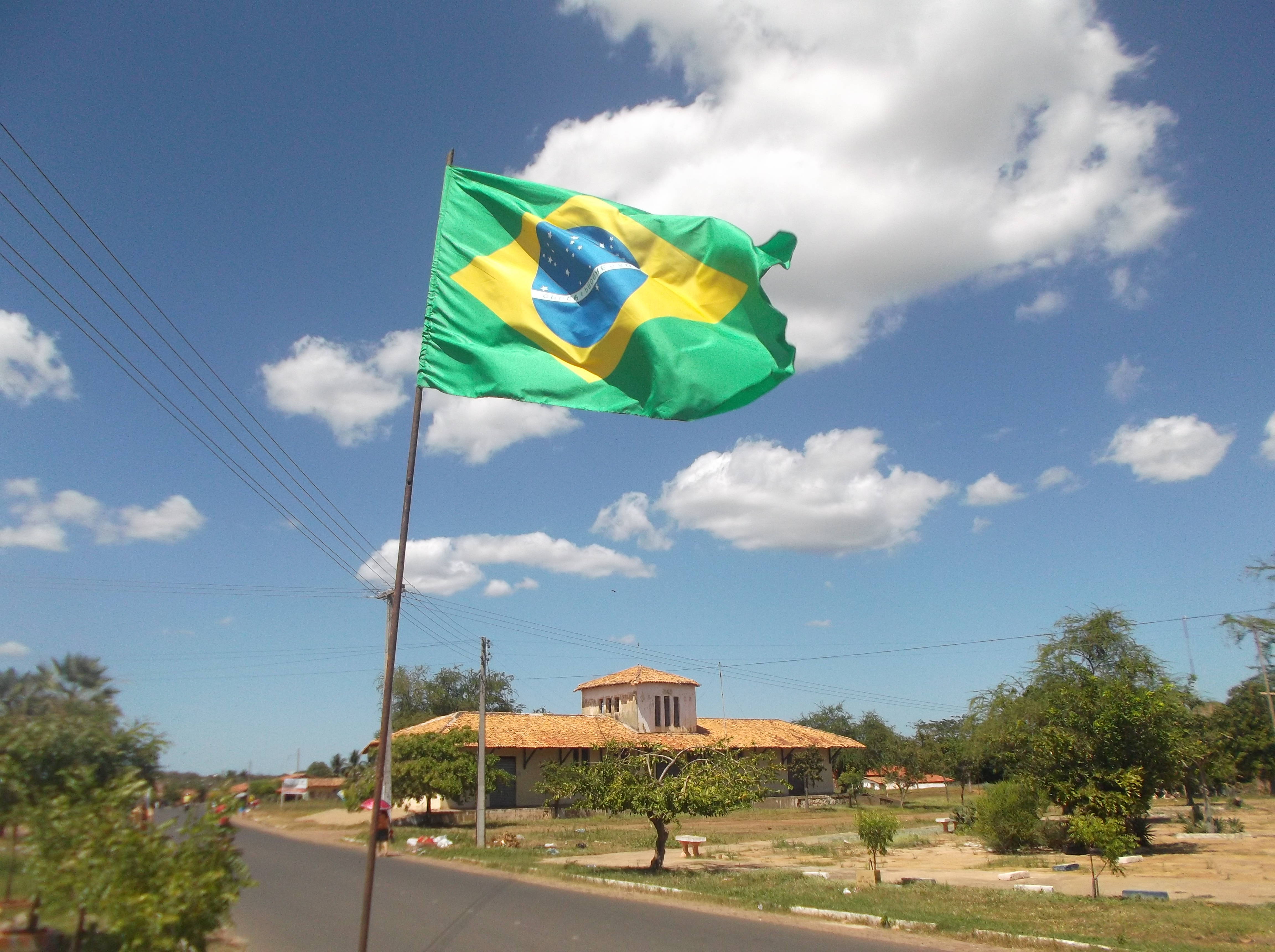 Bandeira do Brasil hasteada por manifestação popular no entorno da Praça da Estação Ferroviária de Campo Maior, no Piauí.